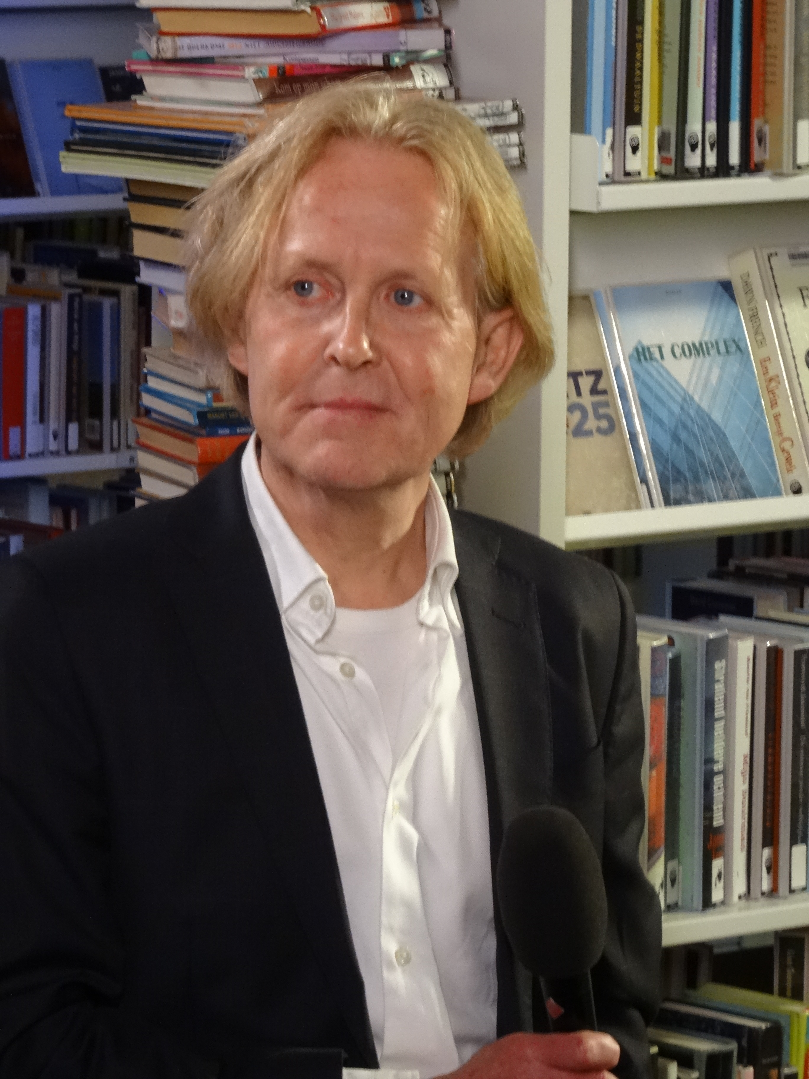 Thomas Rosenboom tijdens BoekenFEST 2016 in Assen